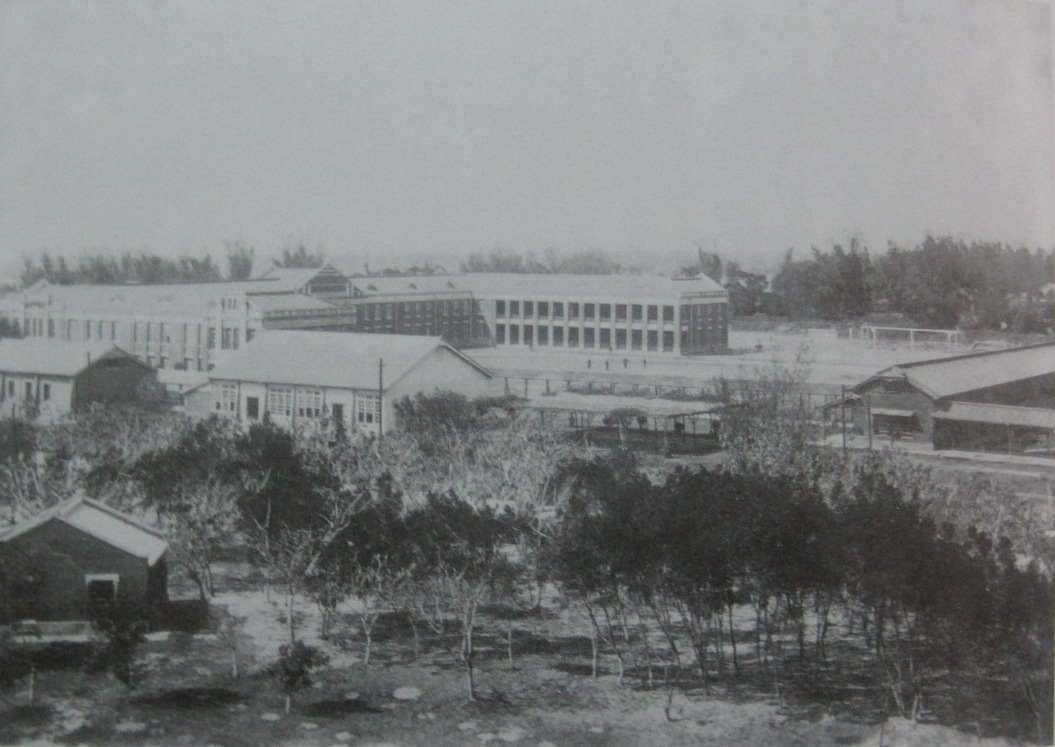 臺中一中日治時期校舍